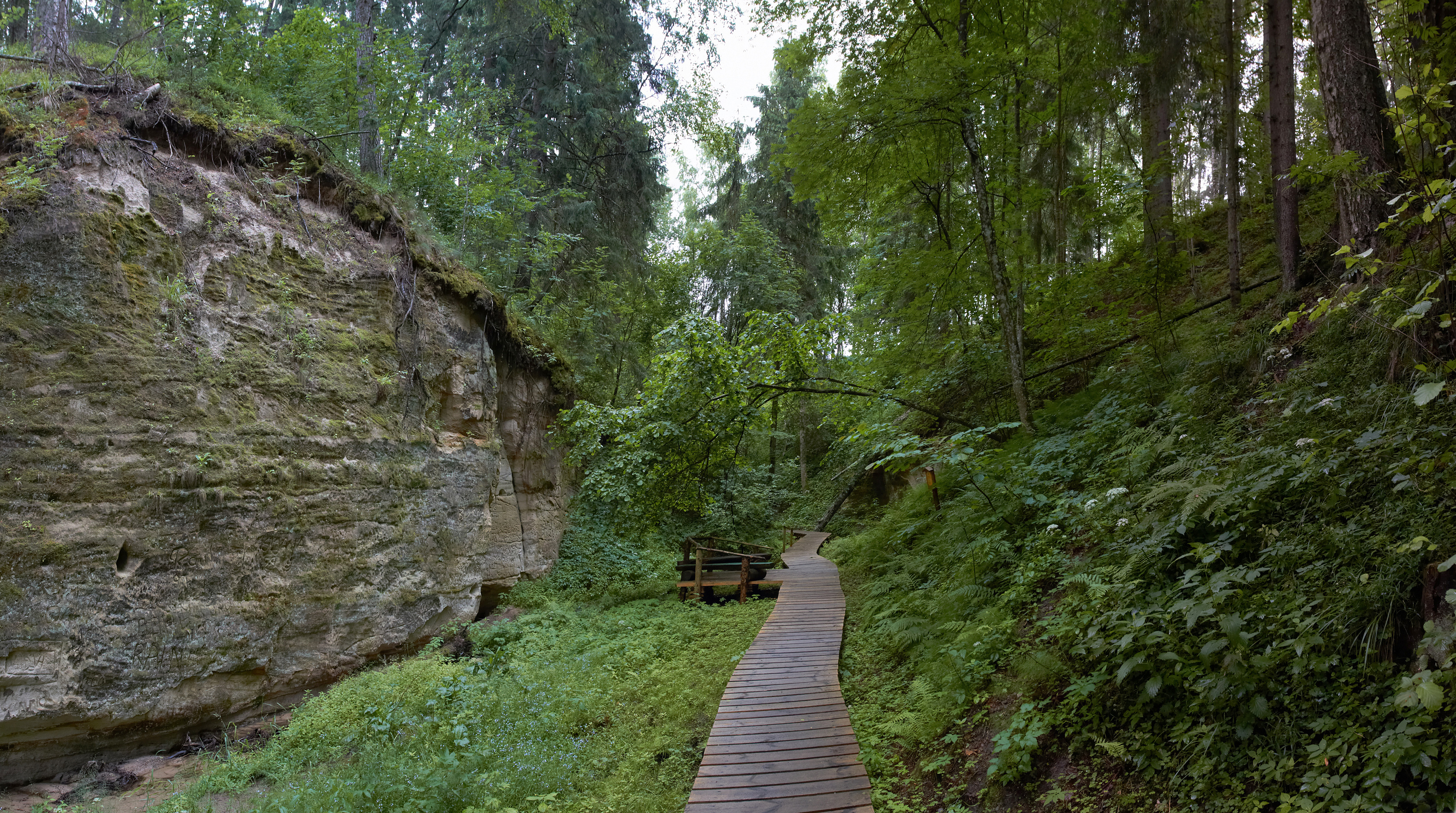 Hinni kanjon 2011. aastal